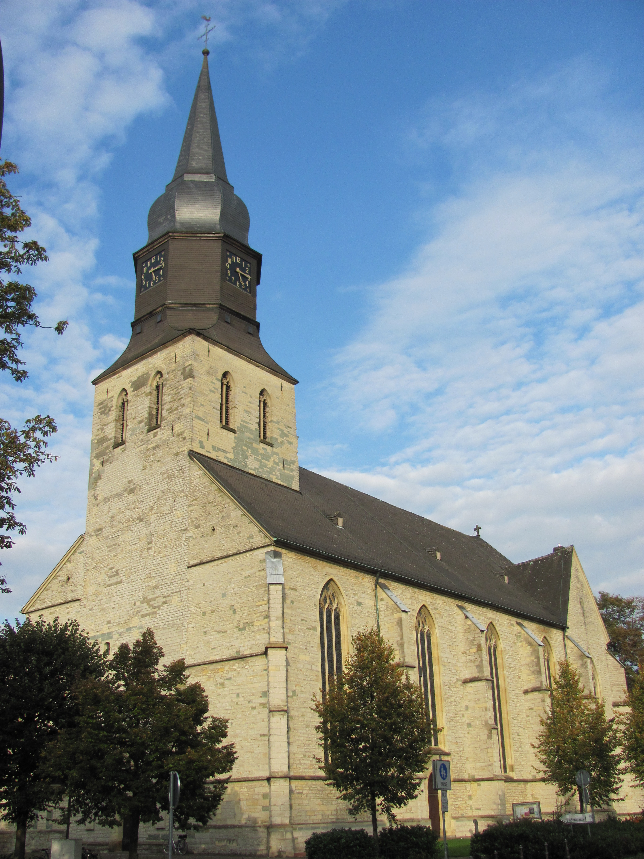 St. Stephanus in Beckum, Gesamtansicht